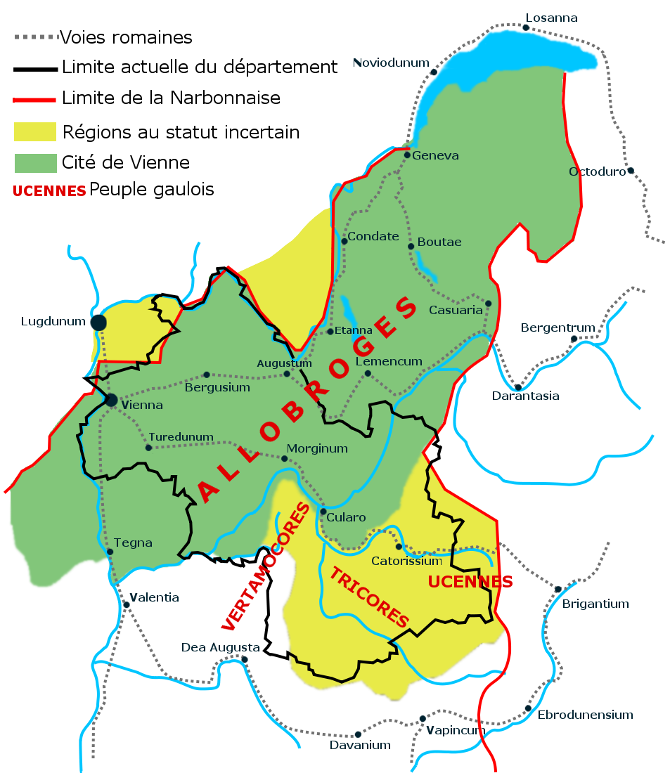 Carte des peuples gaulois en Isère réalisée par moi-même (Pedro38) avec Gimp sur le modèle de « La cité de Vienne : Un vaste territoire », Atlas du patrimoine de l’Isère, p41, édition : Glénat.